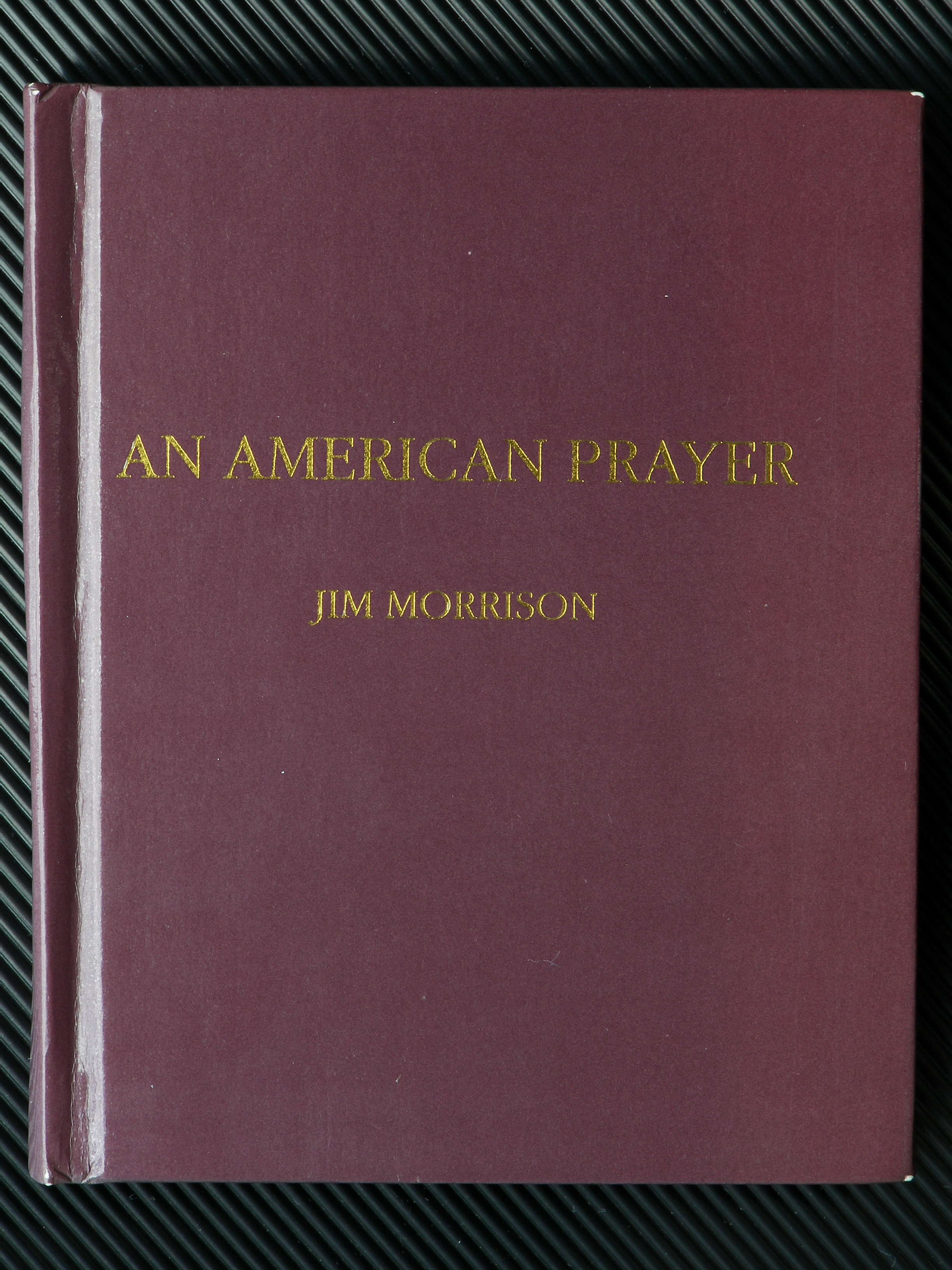 Einband des Gedichtbands "An American Prayer" von Jim Morrison aus dem Jahr 1970, Privatdruck bei Western Lithographers , Auflage 500 Exemplare (von Fans und Kritikern am meisten gelobtes Werk), eigene Sammlung